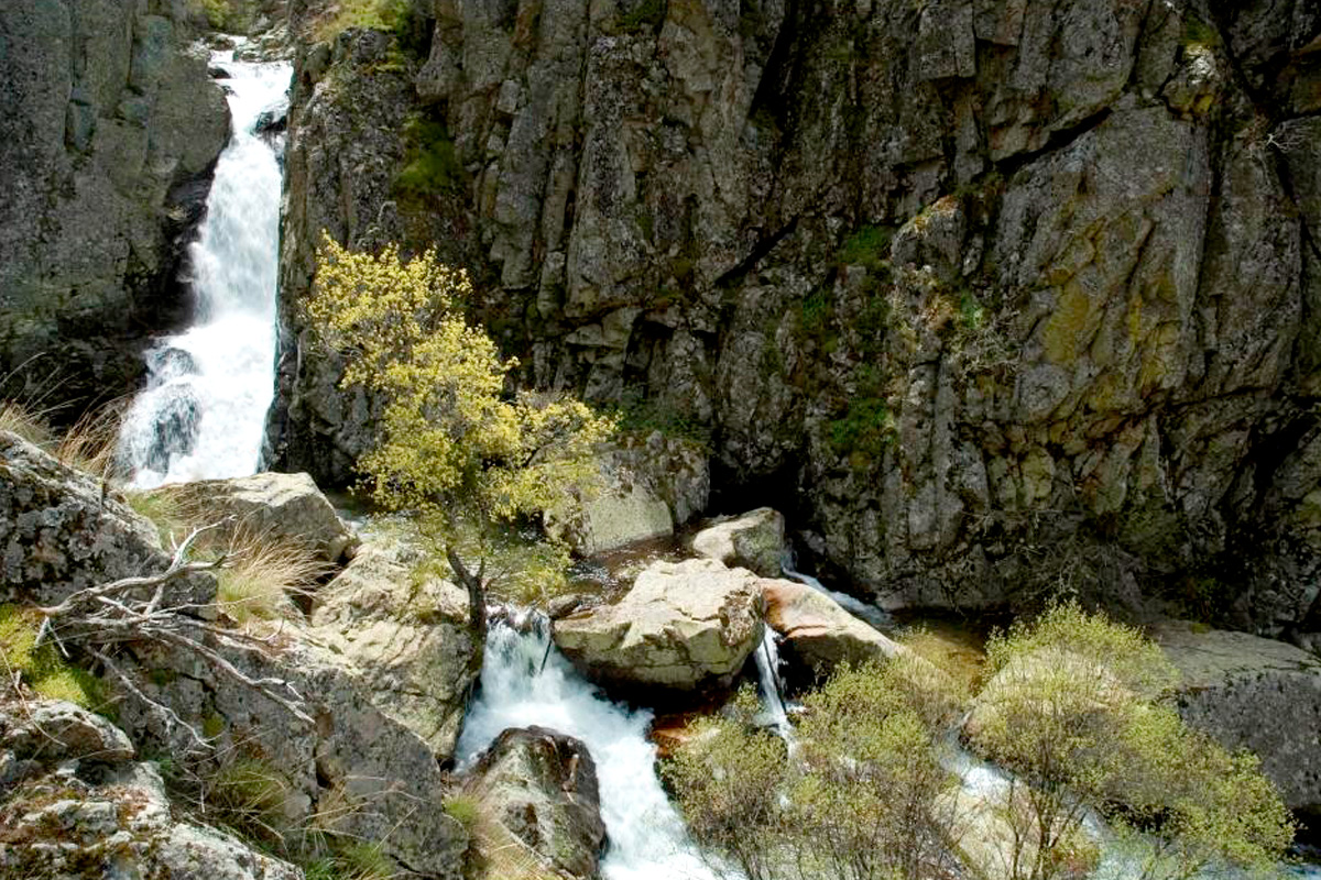 Las Cascadas del Purgatorio es un conjunto de cascadas situadas en la zona central de la Sierra de Guadarrama (sierra perteneciente al Sistema Central), concretamente en la zona alta del Valle del Lozoya, en la vertiente norte de la alineación montañosa de Cuerda Larga.